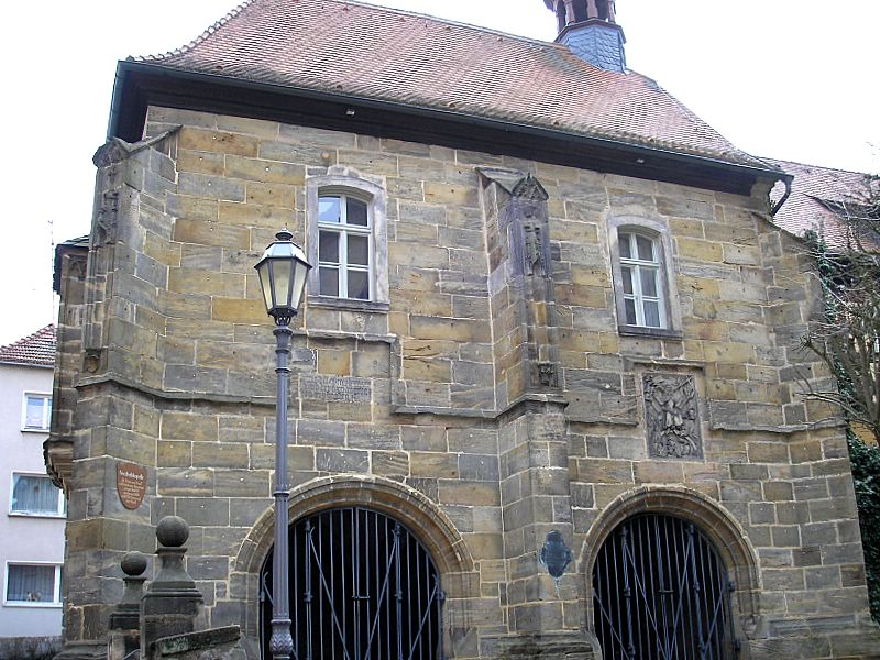 Ebern (Ufr.), Beinhaus (Karner) neben der Pfarrkirche. Eigene Aufnahme, April 2006